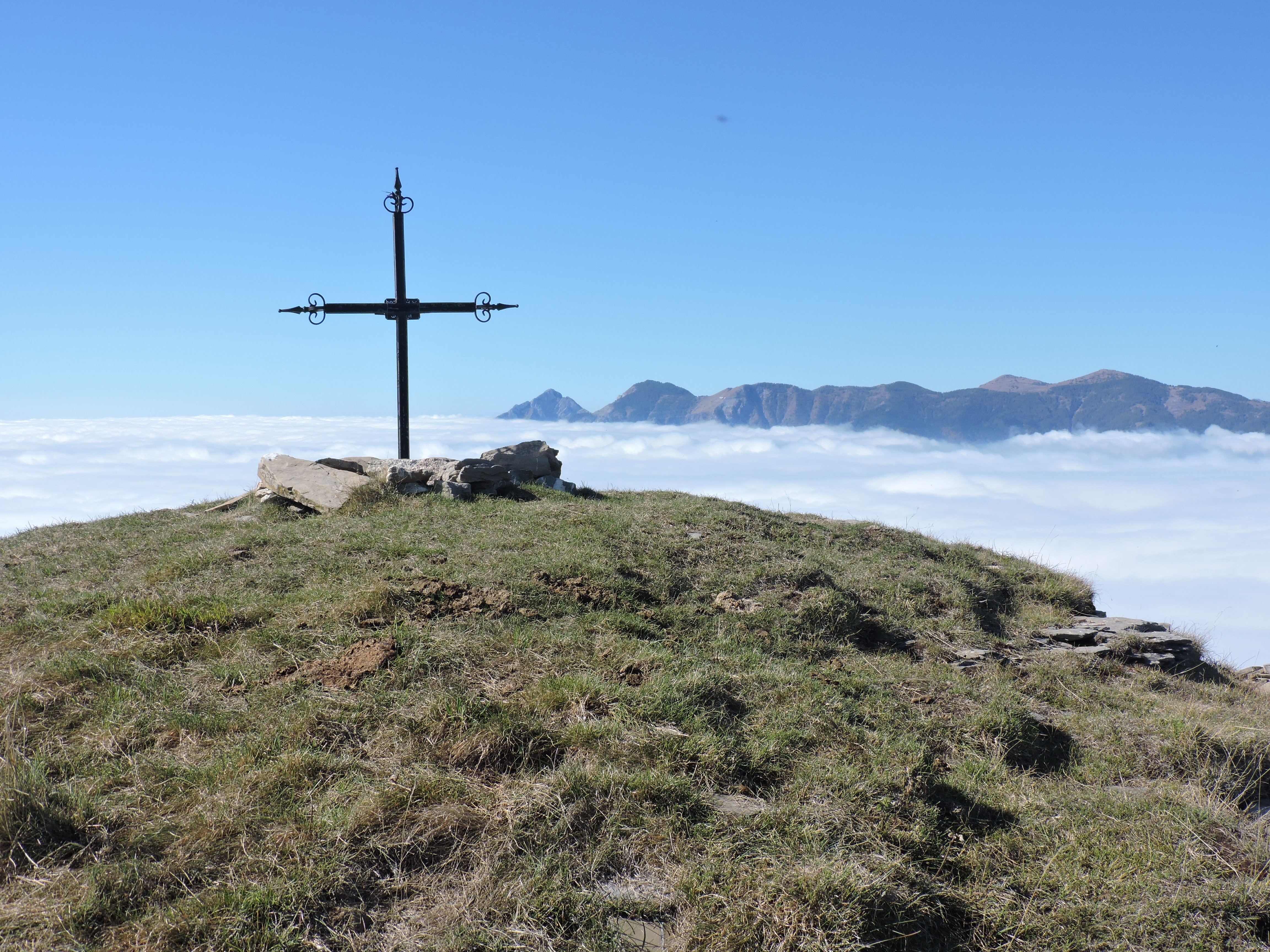 Parco naturale regionale delle Alpi Liguri (Q3895678) Monte Monega summit cross, in the background mounts Toraggio and Pietravecchia